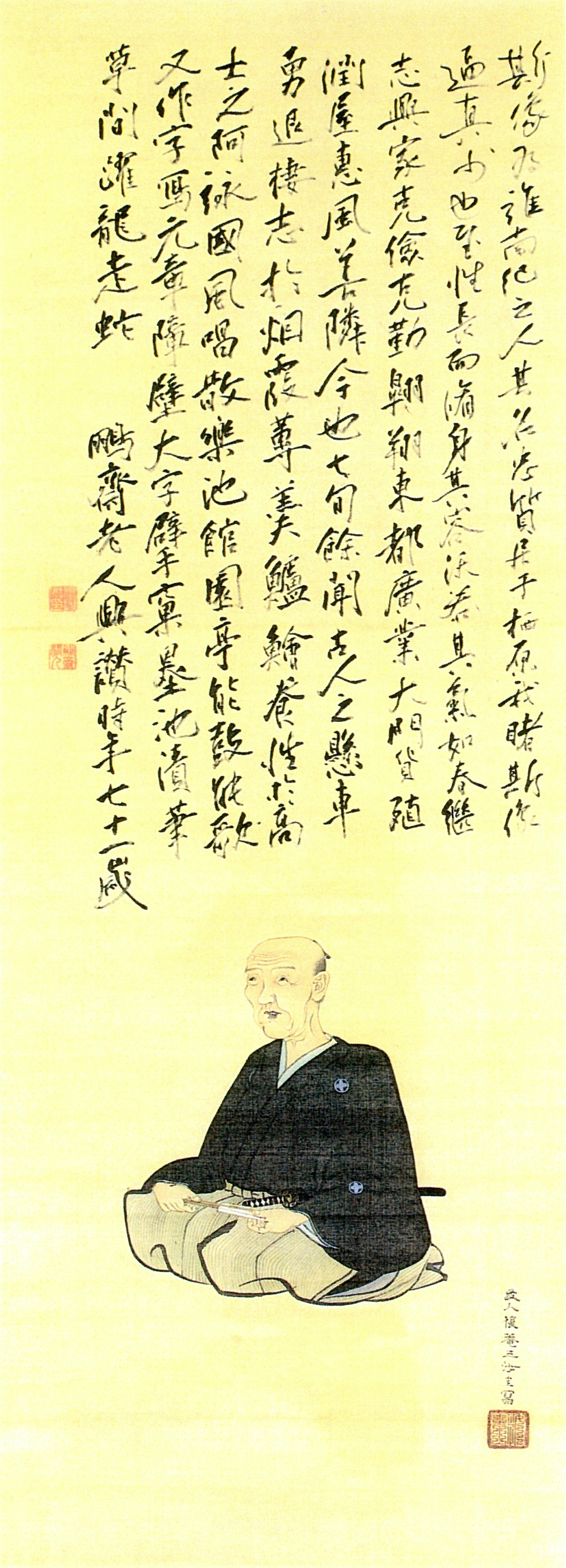 垣内忠質肖像 斯像為誰。南紀之人、其名忠質、居于栖原。我睹斯像、逼真少也。至性長而脩身、其容沃若、其氣如春。繼志興家、克儉克勤、翶翔東都、廣業大門、貨殖潤屋、惠風善隣。今也七旬餘、聞古人之懸車勇退、棲志於烟霞蓴羹鱸鱠、養性於高士之阿、詠國風、唱散樂、池館園亭、能鼓能歌。又作字、寫元章。障壁大字擘窠、墨池漬筆、草間躍龍走蛇。 鵬齋老人興讃。時年七十一歳。